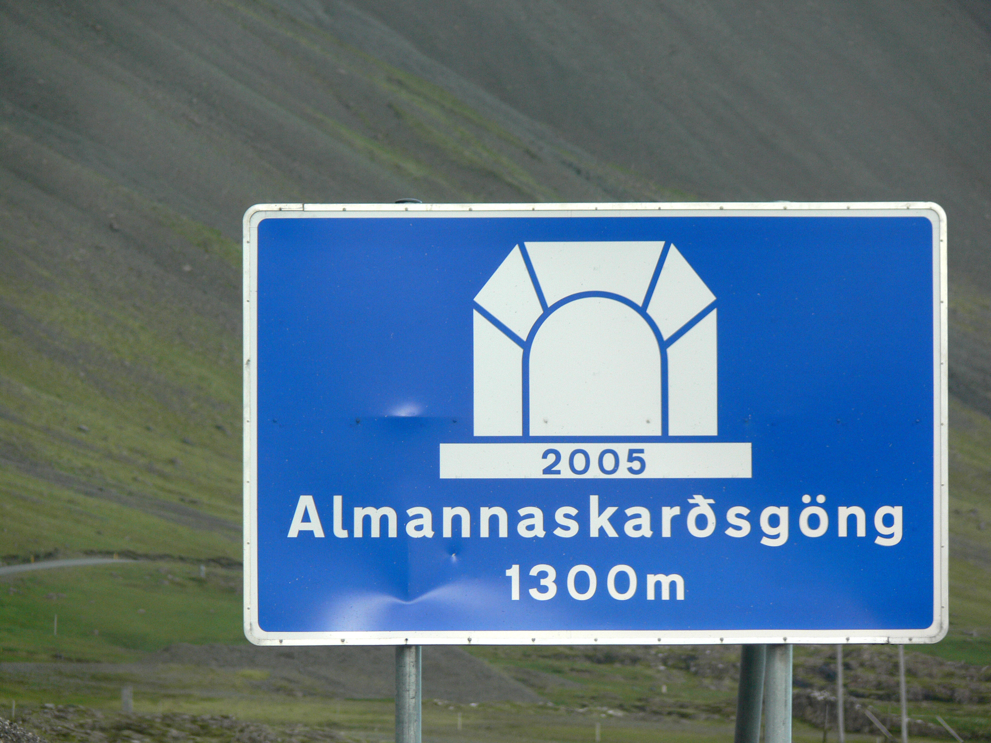 Almannaskarðsgöng auf der Seite von Höfn.